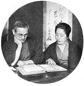 土井英一の遺した資料に見入る晩翠と八枝